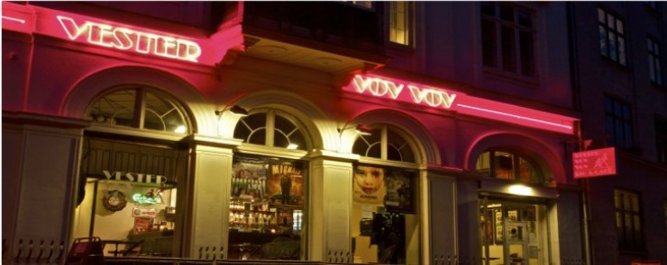 Vester Vov Vov's facade 2012